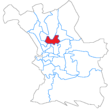 Situation du canton dans la ville de Marseille